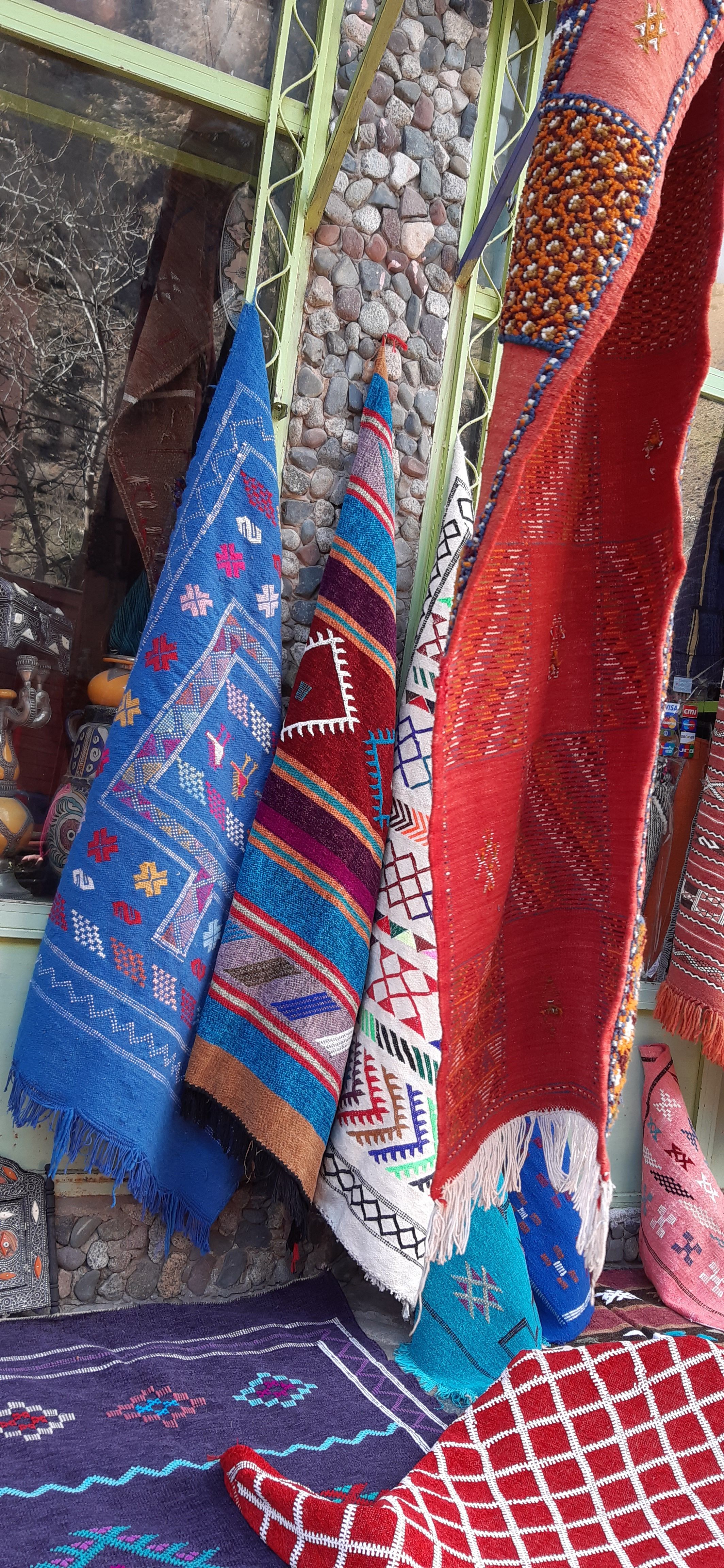 الزربية التقليدية المغربية This photo has been taken in the country: Morocco